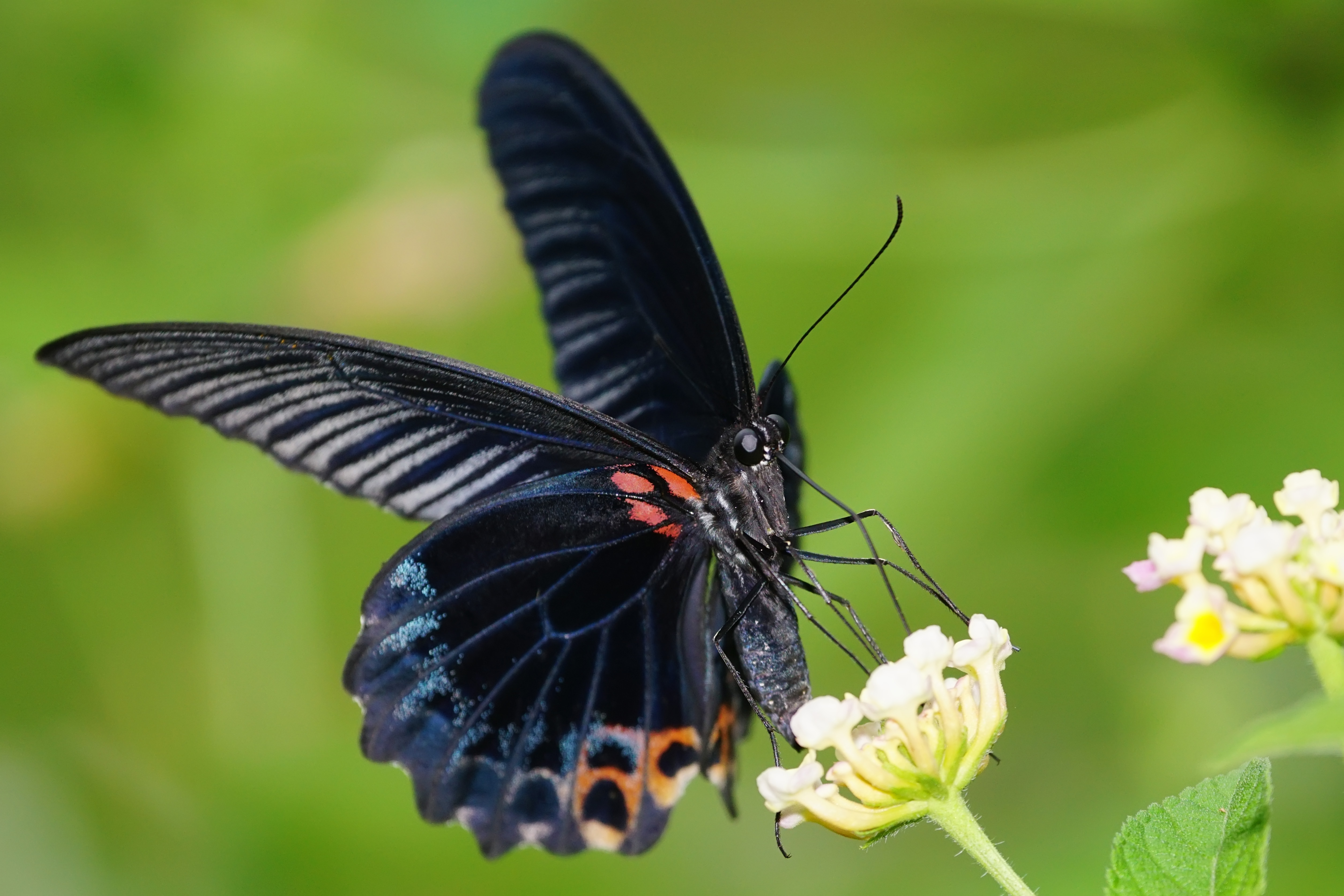 大鳳蝶 Papilio memnon heronus